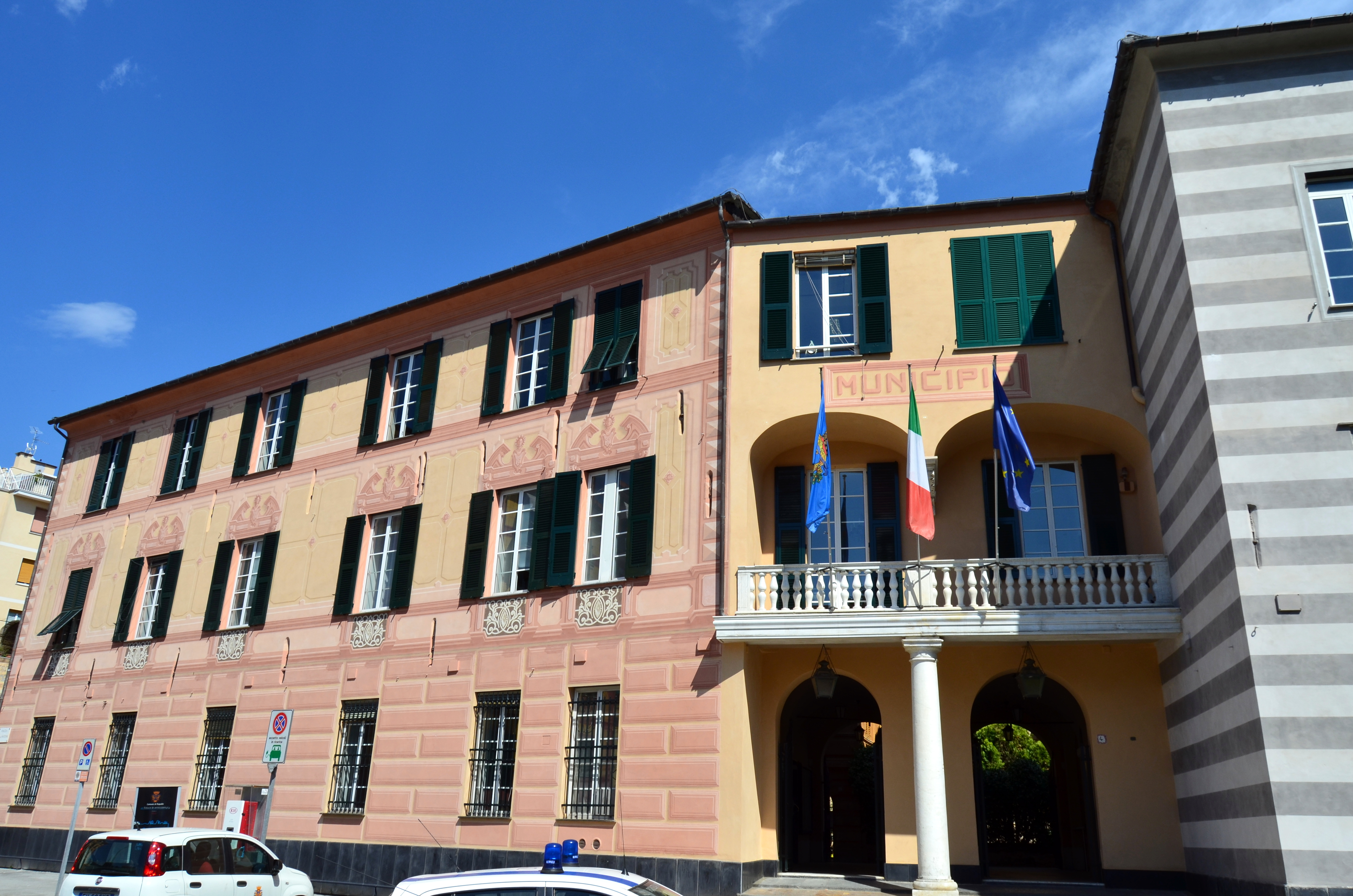 Il palazzo municipale di Rapallo, Liguria, Italia